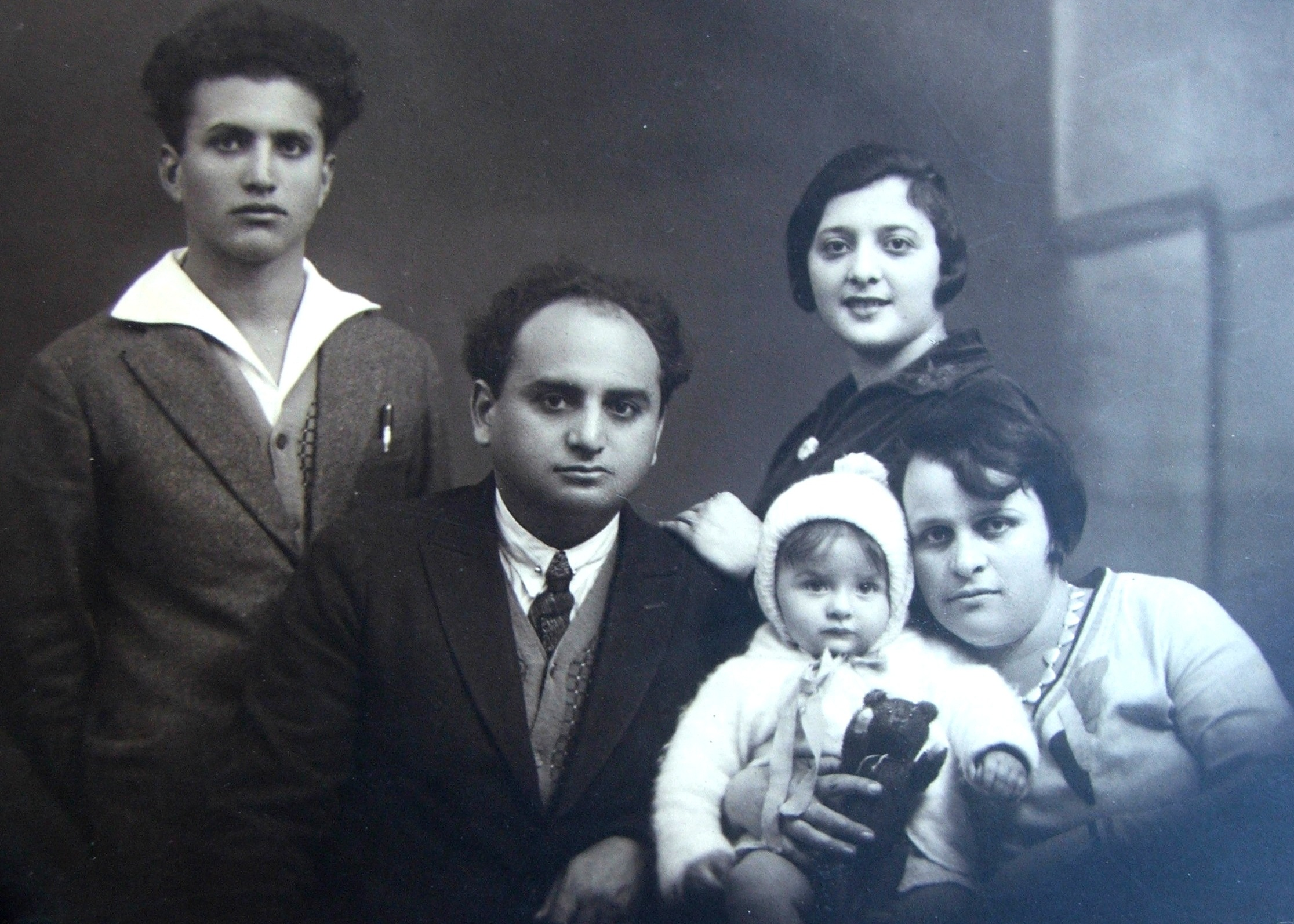 צבי אביבי היה מורה, סופר וממשיל משלים עברי. נפטר בשנת 1966 . הנוכחים הם ישראל, צבי ואשתו אסתר-רחל לבית גלייברמן, אחותו שולמית קרני לבית אביבי (רזניק) ובתו שילה כיום שילה דורון. שילה נולדה ב 1929 בתל אביב עם משפחתו